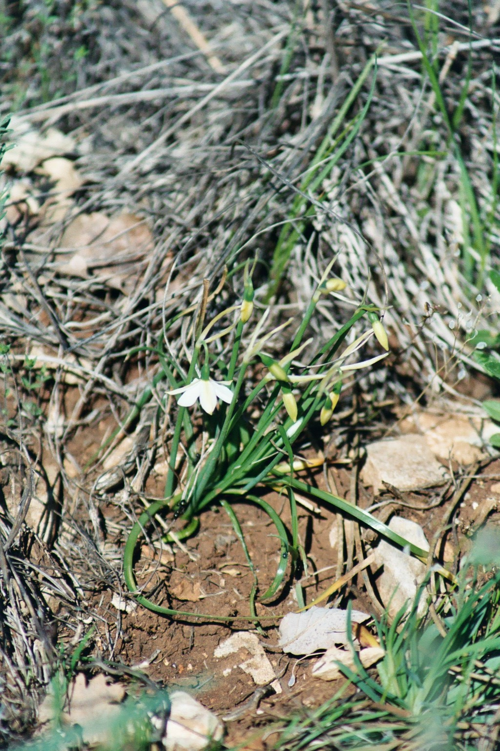 Acis fabrei au Mont Ventoux